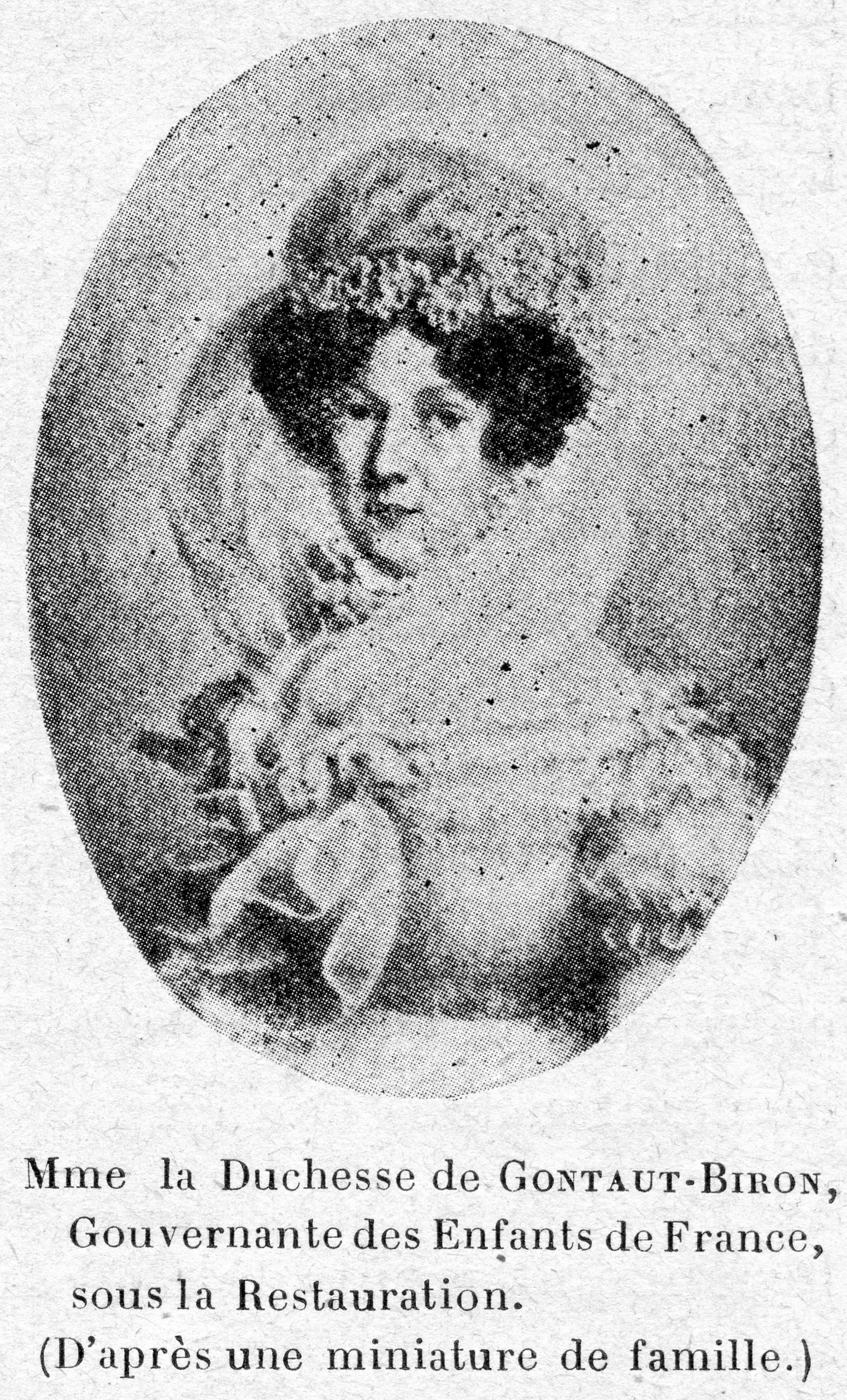 Cabanès, Éducation de Princes016 Mme la Duchesse de Gontaut-Biron, Gouvernante des Enfants de France, sous la Restauration